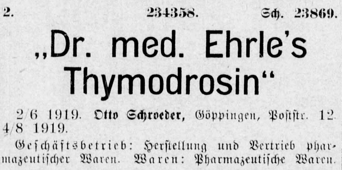 Warenzeichen Thymodrosin der Firma Otto Schroeder, Göppingen